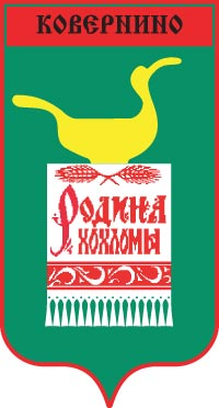 Герб Ковернинского района Нижегородской области России